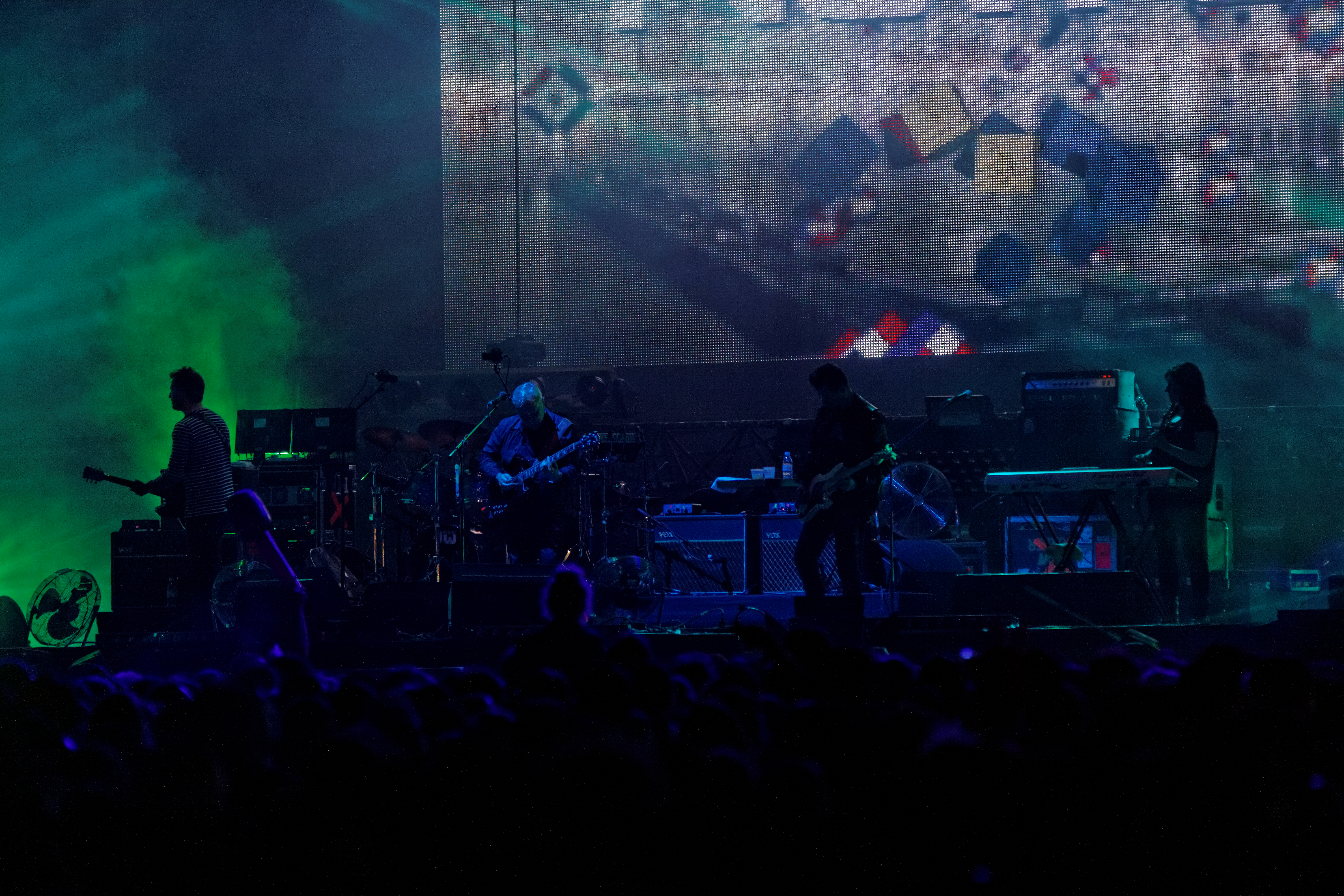 New Order en concert sur la grande scène lors de la fête de l'Humanité 2012.